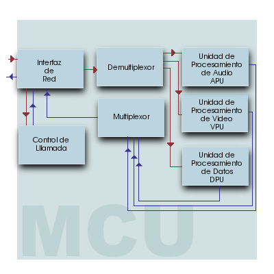 Componentes de un MCU